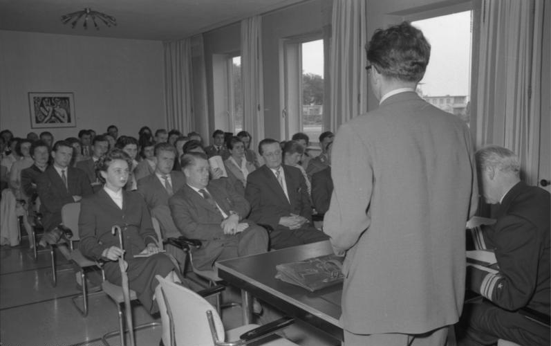 Germersheimer Studenten Fragestunde im kl. Sitzungssaal des BPA, Bonn Mitglieder der Hochschulgruppe der Europa-Union am Auslands- u. Dolmetscherinstitut der Universität Mainz und Germersheim u. des Kreisverbandes Germersheim der Europa-Union. Letzterer zeichnete für die Fahrt verantwortlich Vortragender: Dr. Six, BPA